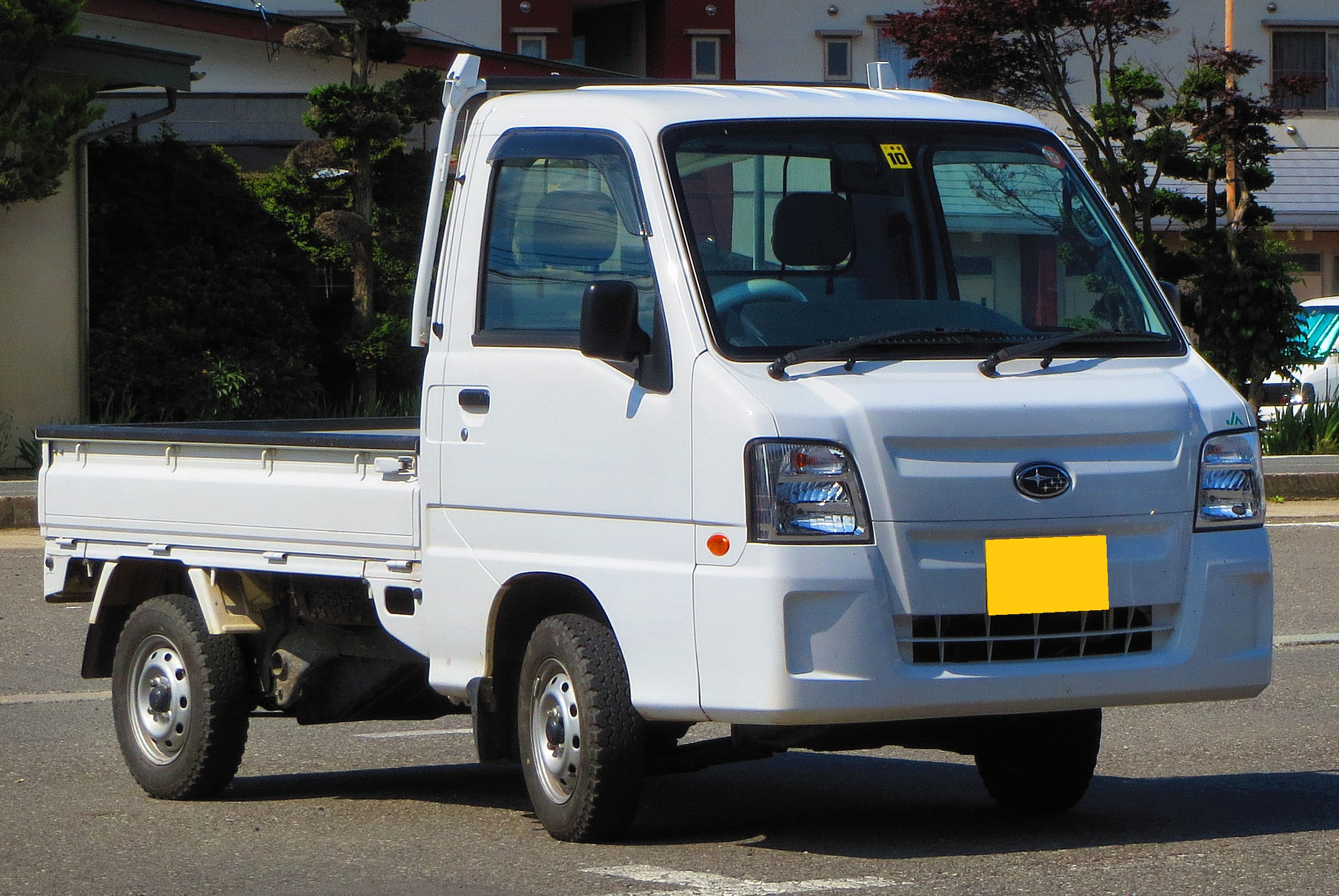 スバルサンバーJAトラックAWD